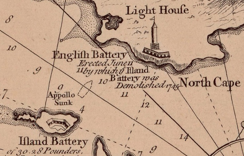 Détail d'une carte anglaise de 1758 relatant la présence du vaisseau français l'Apollon sabordé dans la passe lors du siège (Appollo Sunk).